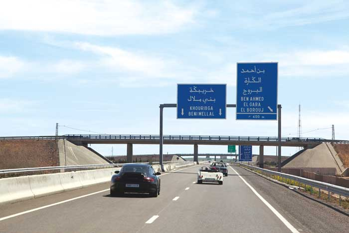 Autoroute A4 Béni Mellal - Berrechid